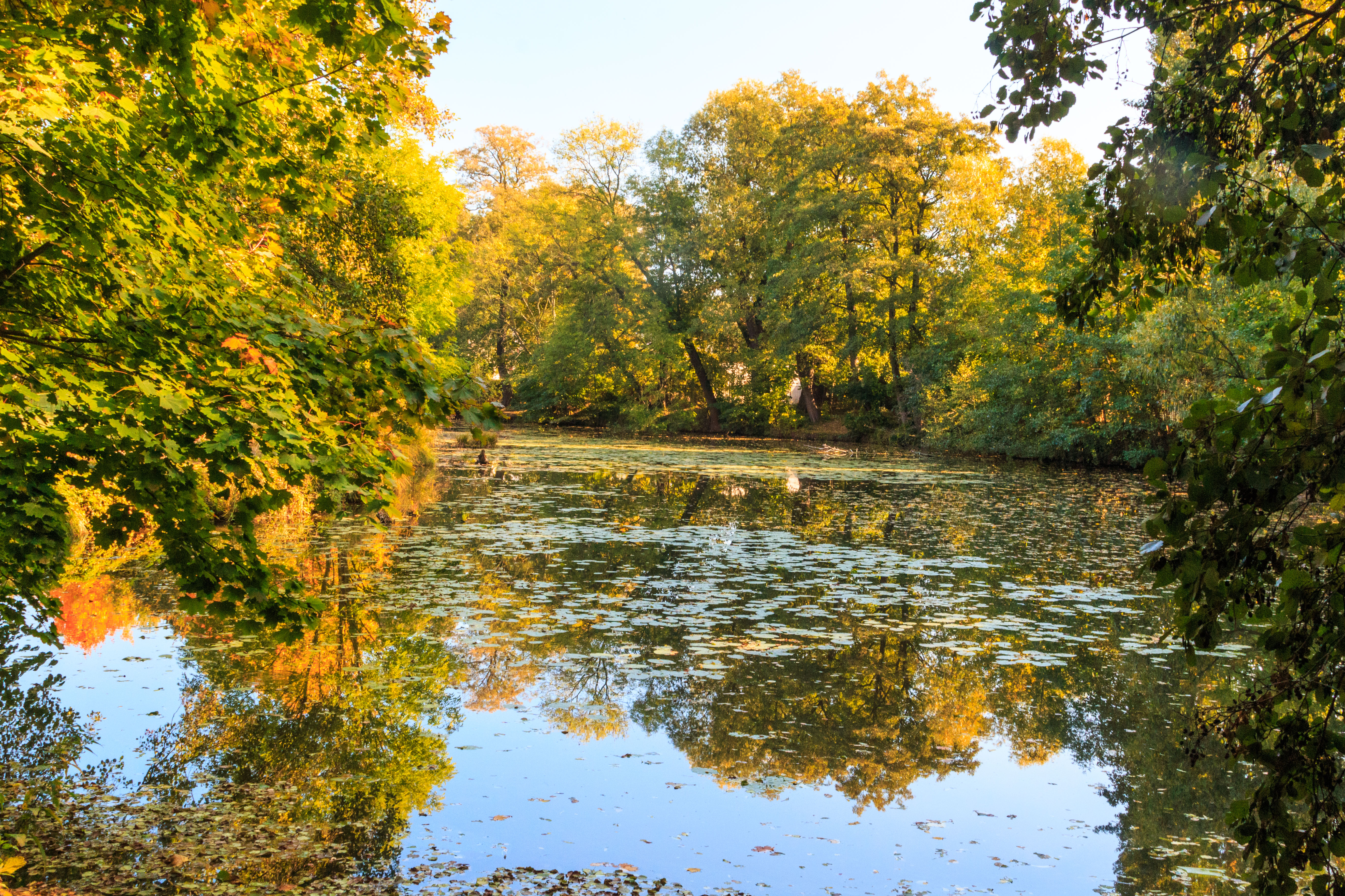 Bejkovna - mrtvé rameno Orlice v Hradci Králové Project: Vodstvo